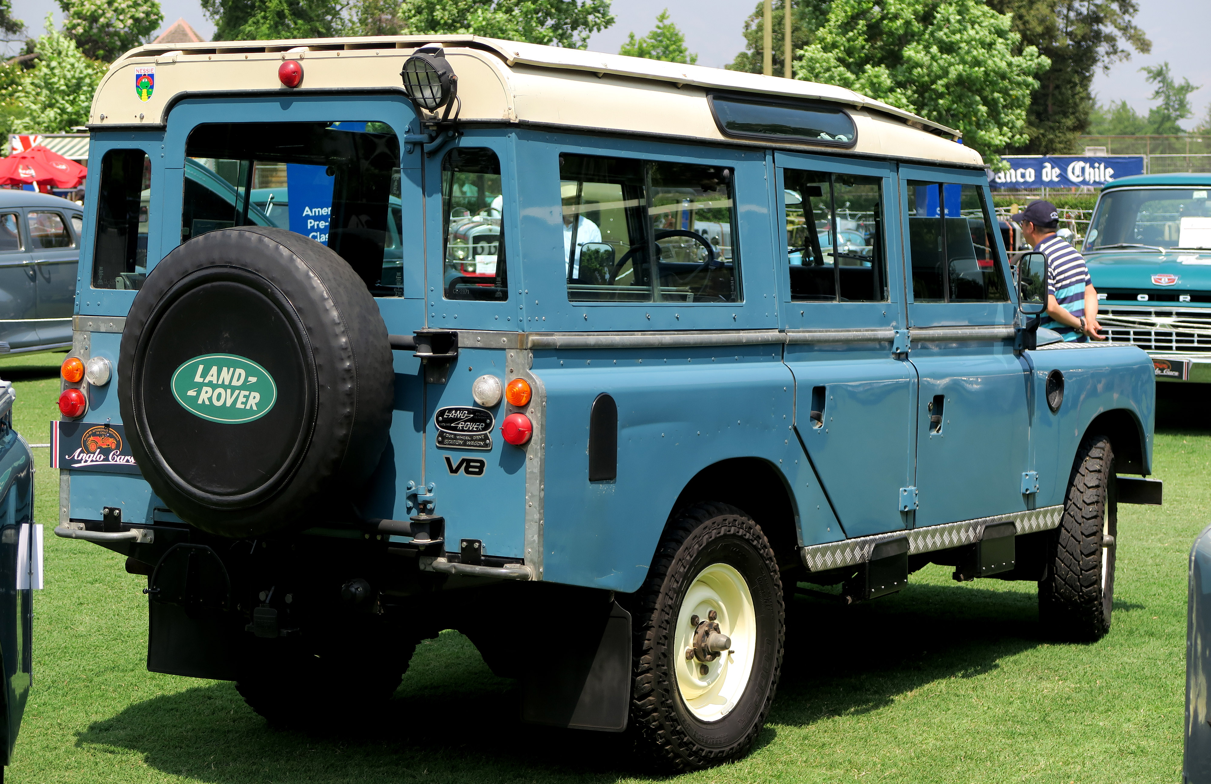 Land Rover 109 Serie 3 V8 1982